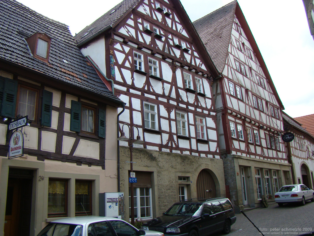 Historisches Gebäude Altstadtstraße 22 in Eppingen